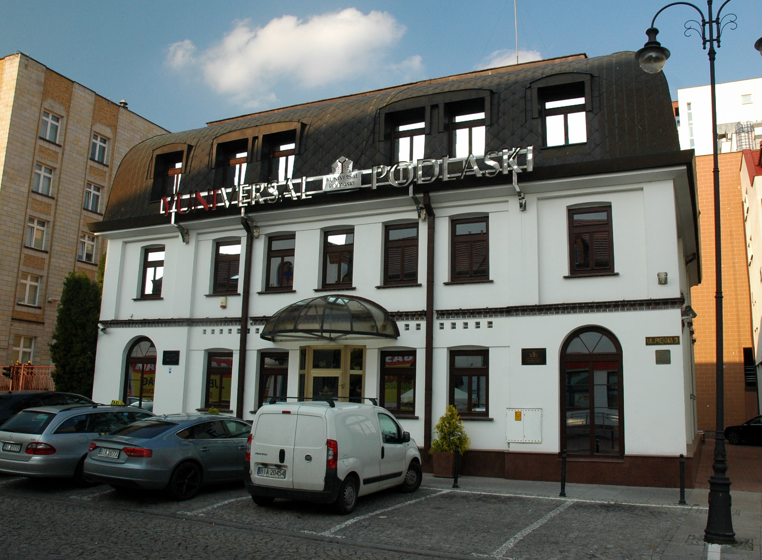 Synagoga Piaskower w Białymstoku